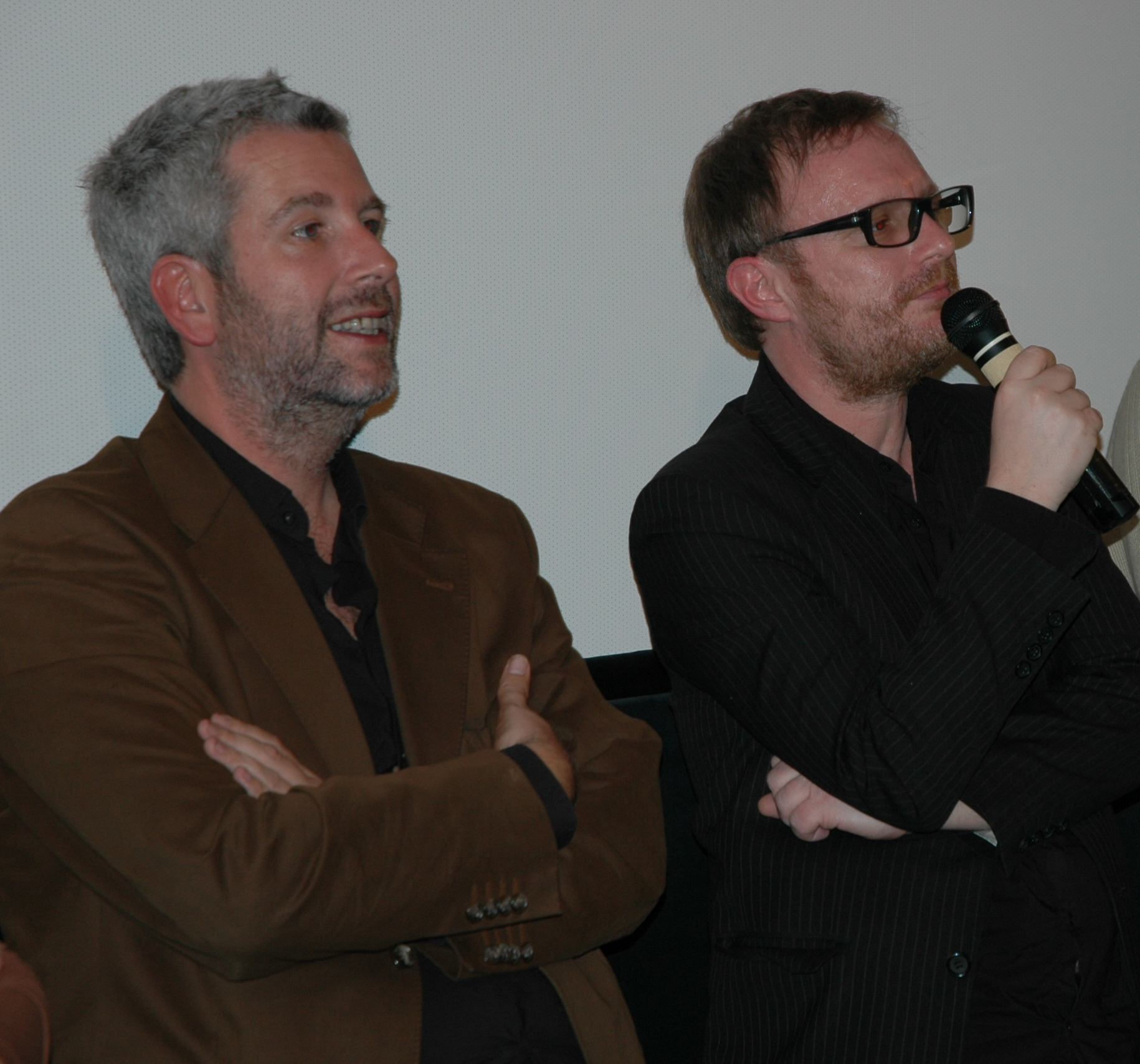 Dirk Stermann (links) und Christoph Grissemann (rechts) bei der Oberösterreich-Premiere von "Immer nie am Meer" im Linzer Kino "Moviemento" am 8. März 2007